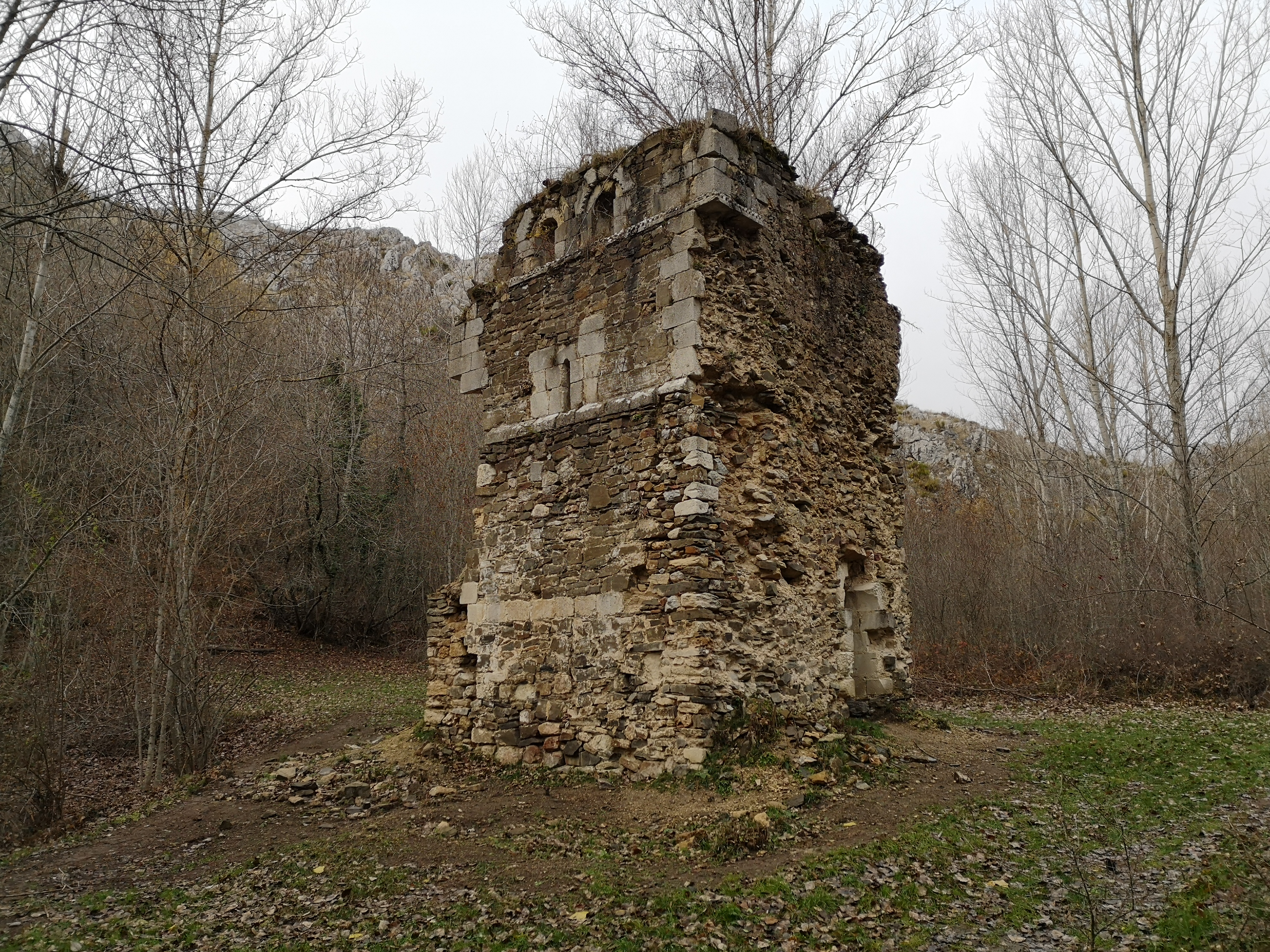 Torre de la iglesia del antiguo Monasterio de San Román de Entrepeñas en Palencia (España)